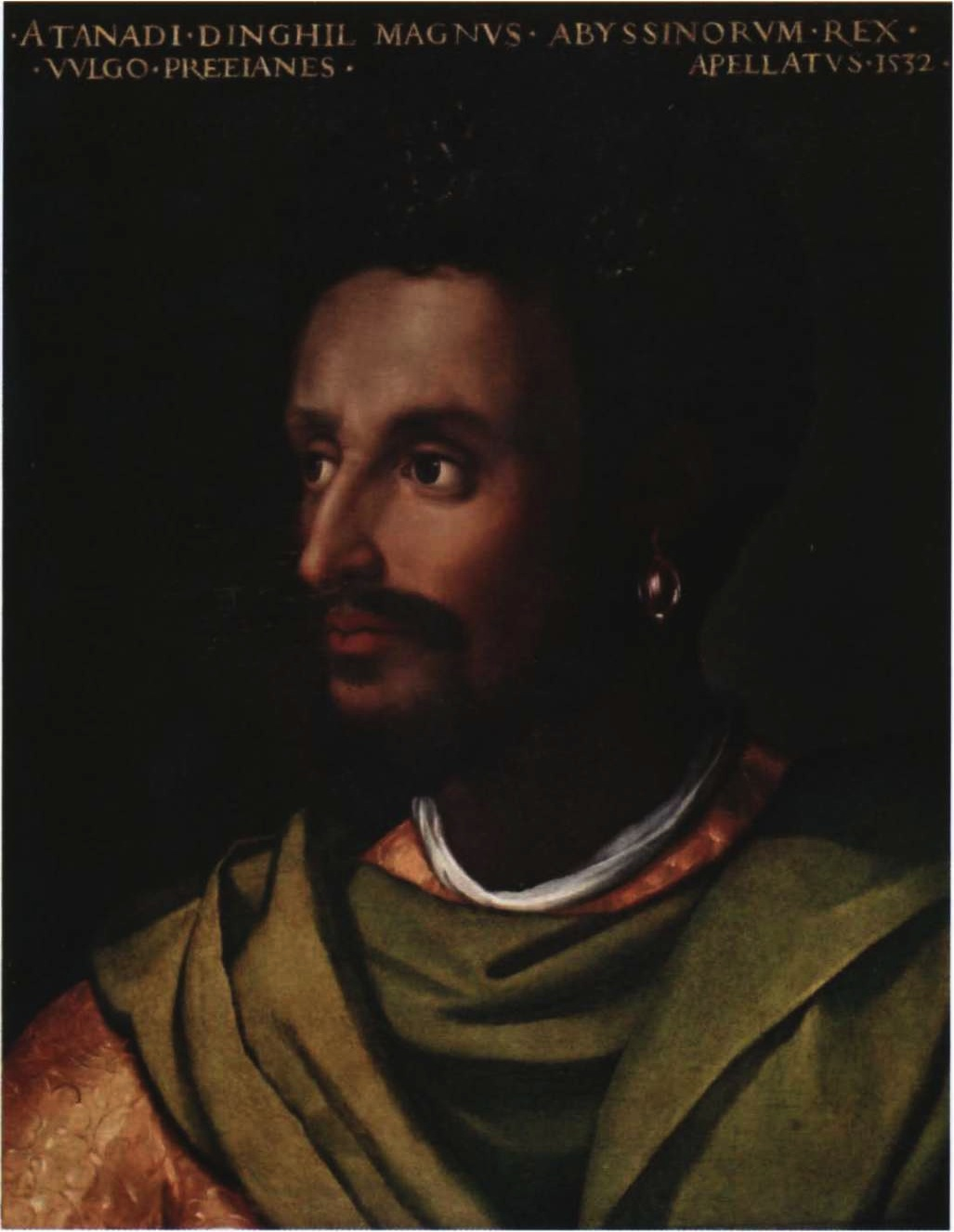 Cristofano dell’Altissimo, Portrait of Lebnä-Dengel. c. 1552-1568.